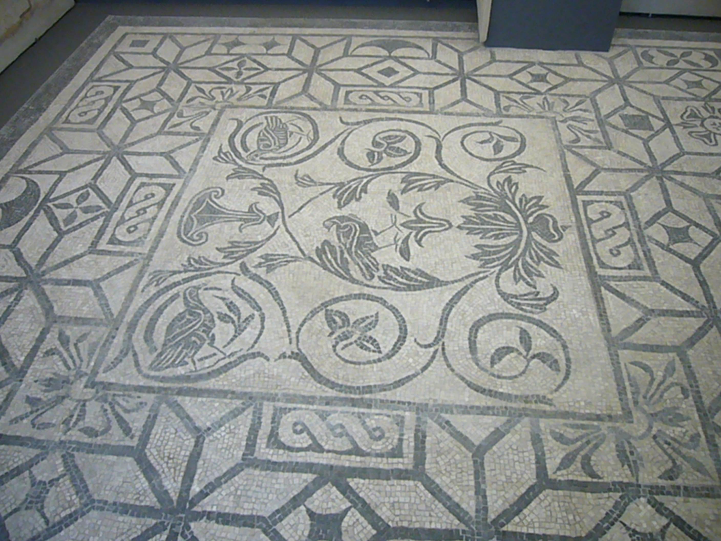 Roma, Palazzo Massimo alle Terme, mosaico geometrico con pseudo-emblema (PMT 313)